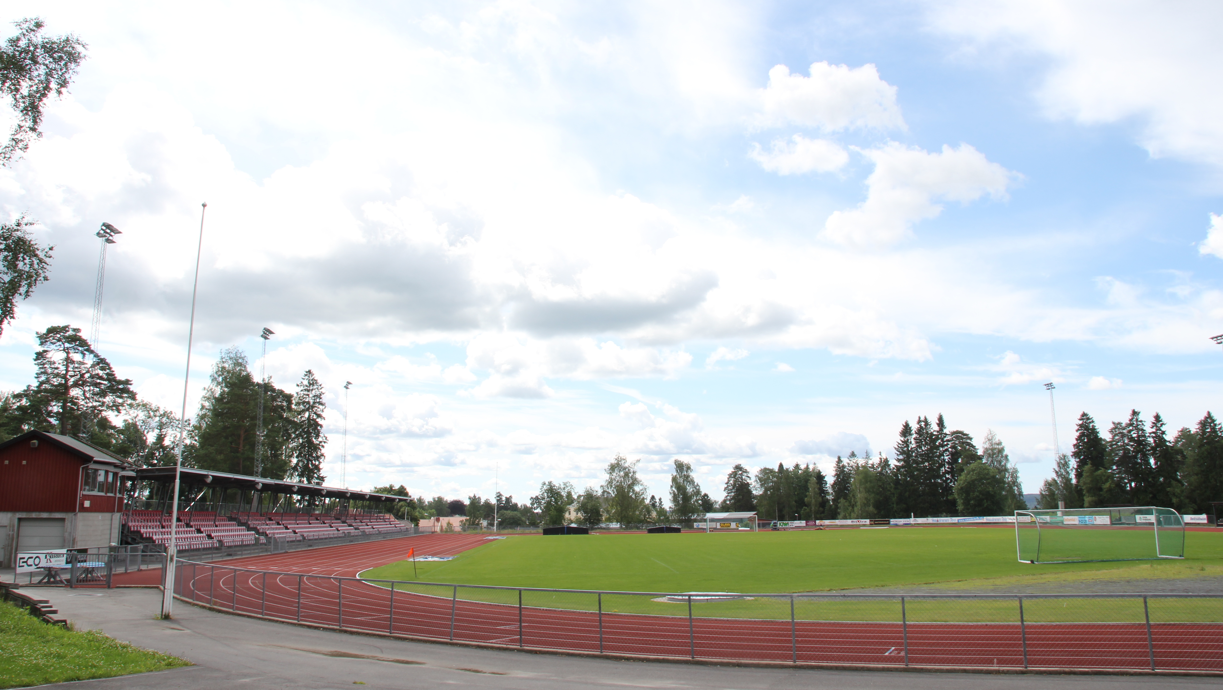 Askim stadion er fotballstadionet til Askim FK. Det er tribune med 500 sitteplasser.